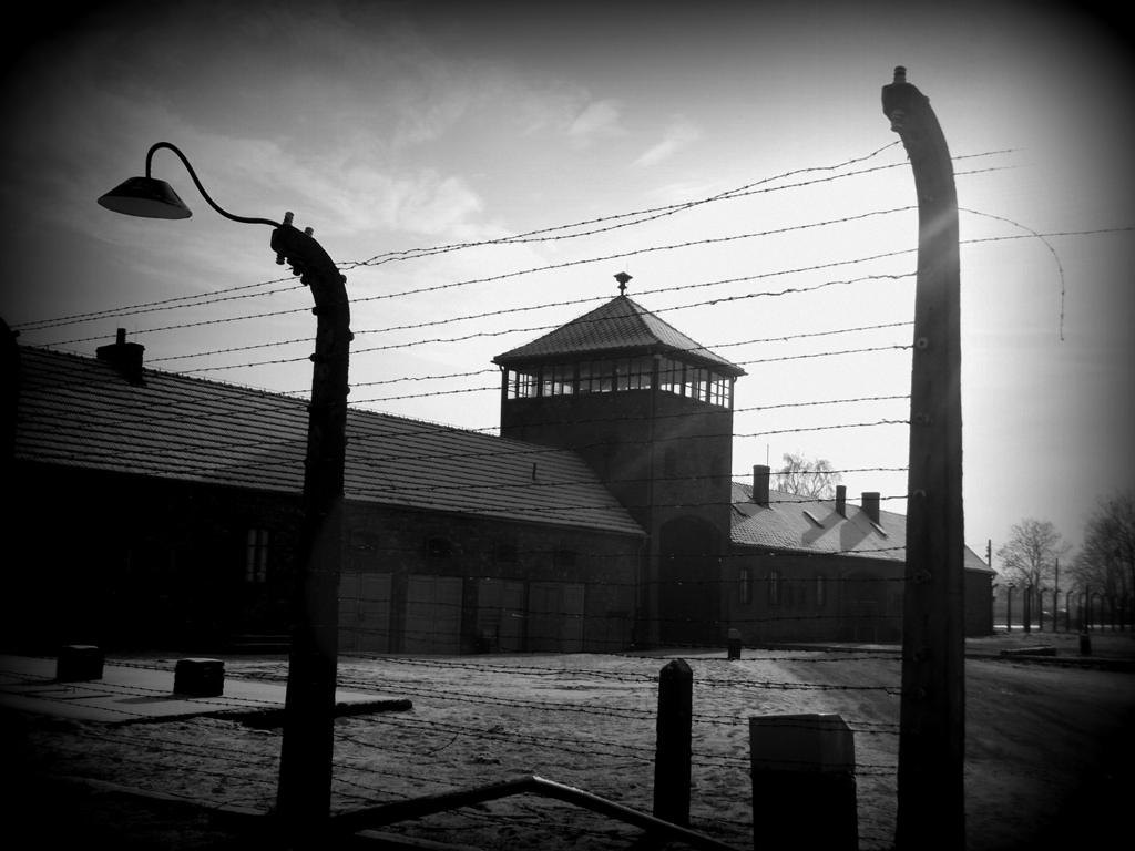 Zdjęcie zrobione podczas 69. rocznicy wyzwolenia KL Auschwitz-Birkenau.